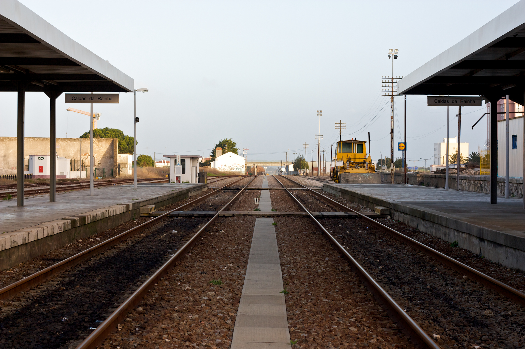 Via férrea: Linha do Oeste [PK 105] Local: Estação de Caldas da Rainha Data e hora: 24 de Janeiro de 2009 [08h33] Sentido: Figueira da Foz